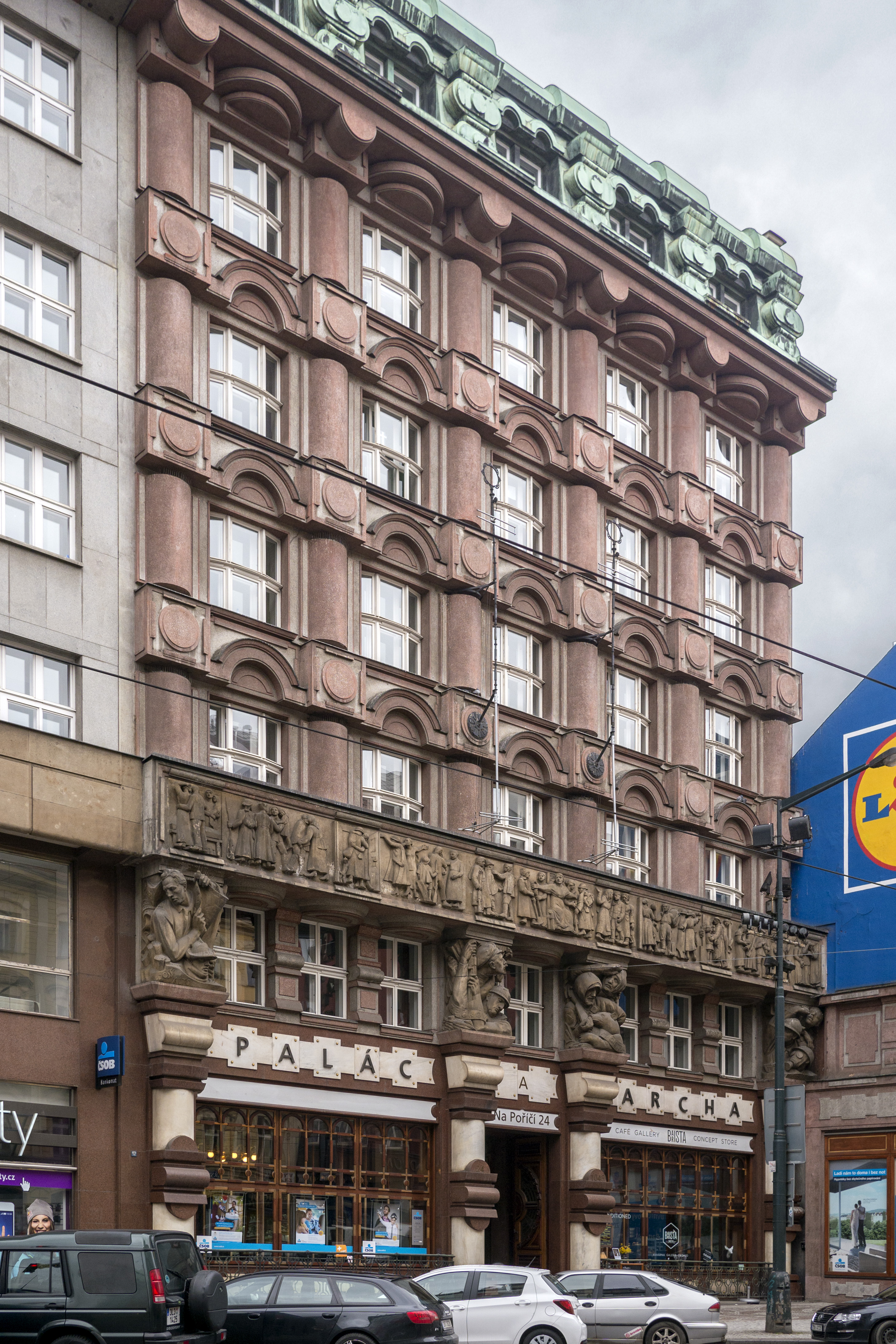 Prag Kubismus Bank der Legionen